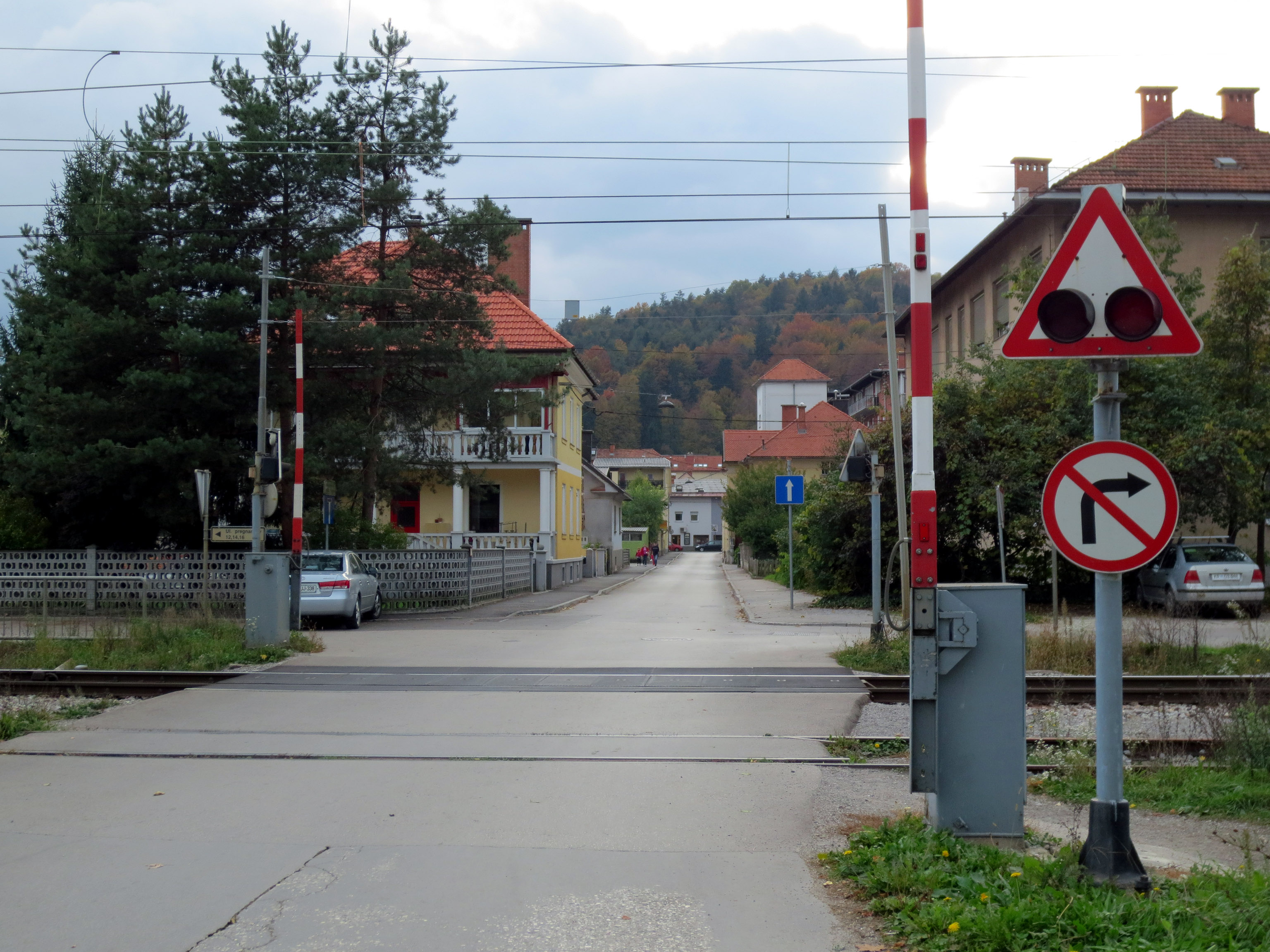 Prehod čez železniško progo